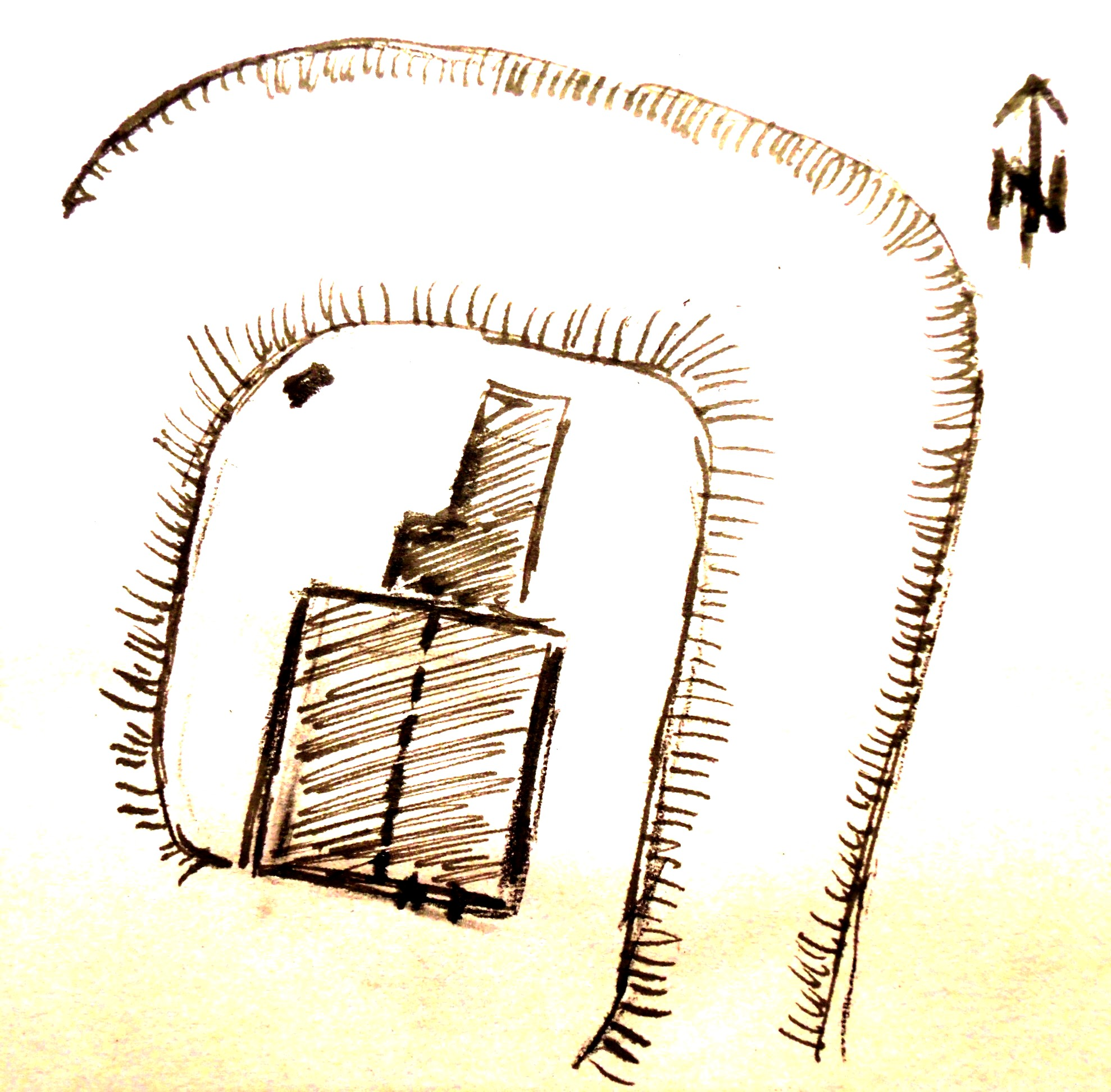 Eibwang (Ortsteil von Kinding imLandkreis Eichstätt), Festes Haus, Lageskizze